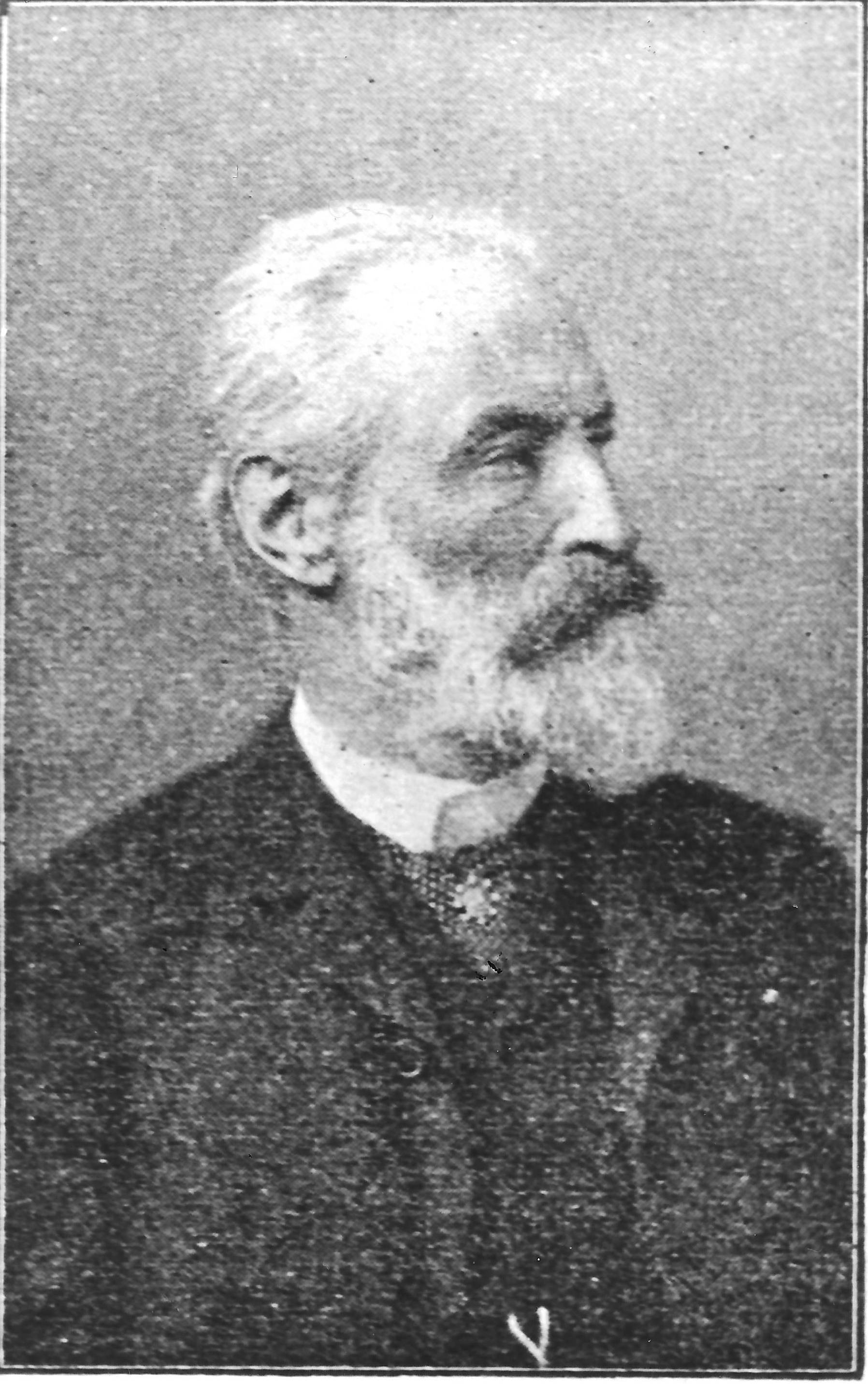 Karl Ludwig Friedrich Becker: Porträt (Fotografie, aus: Katalog der Großen Berliner Kunstausstellung 1897)